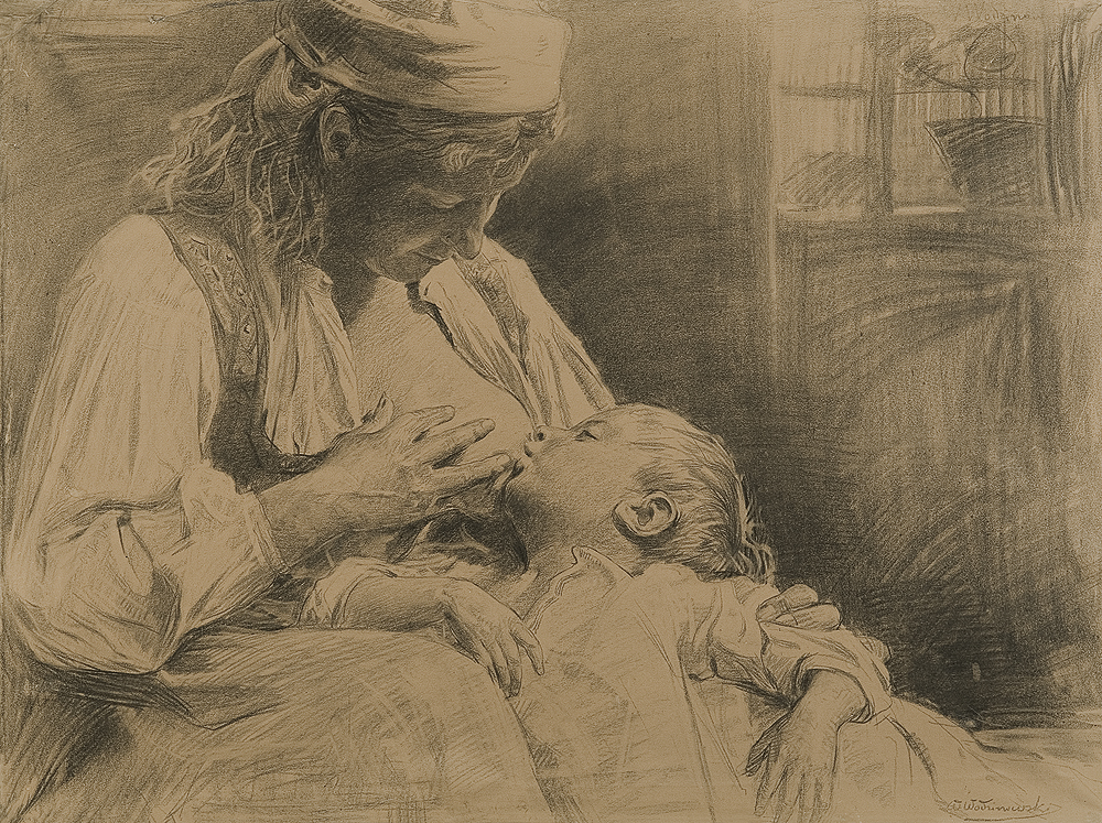 Wincenty Wodzinowski. MACIERZYŃSTWO